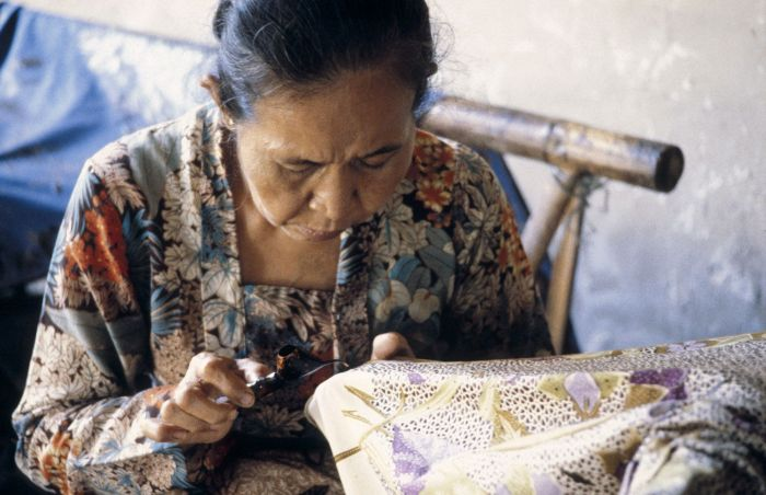 Pembatik dari Masina